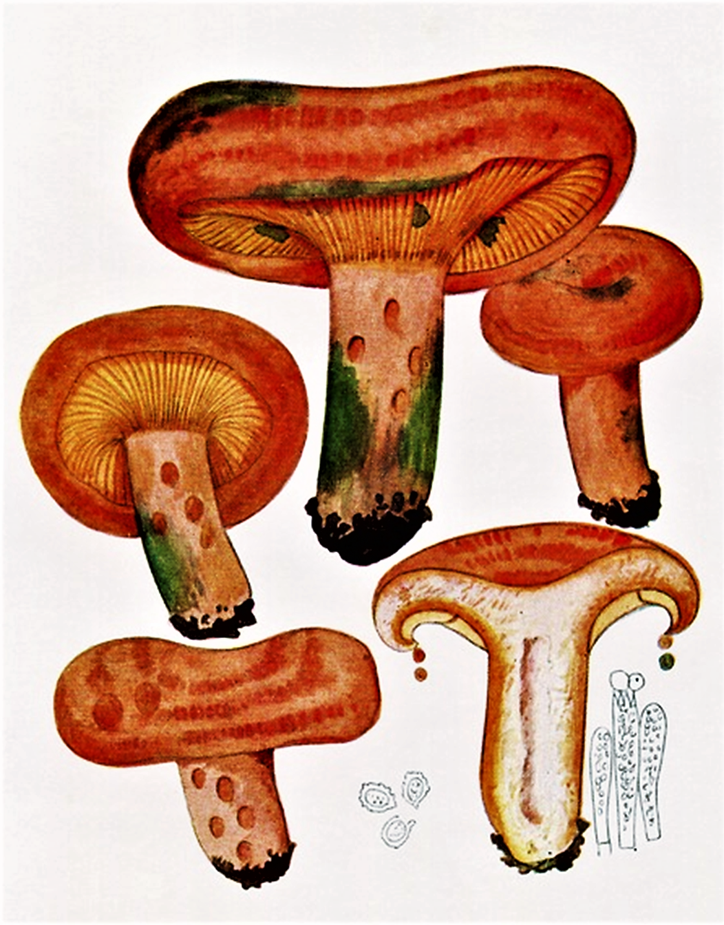 Giacomo Bresadola: Lactarius deliciosus (L., 1753) Gray (1821)